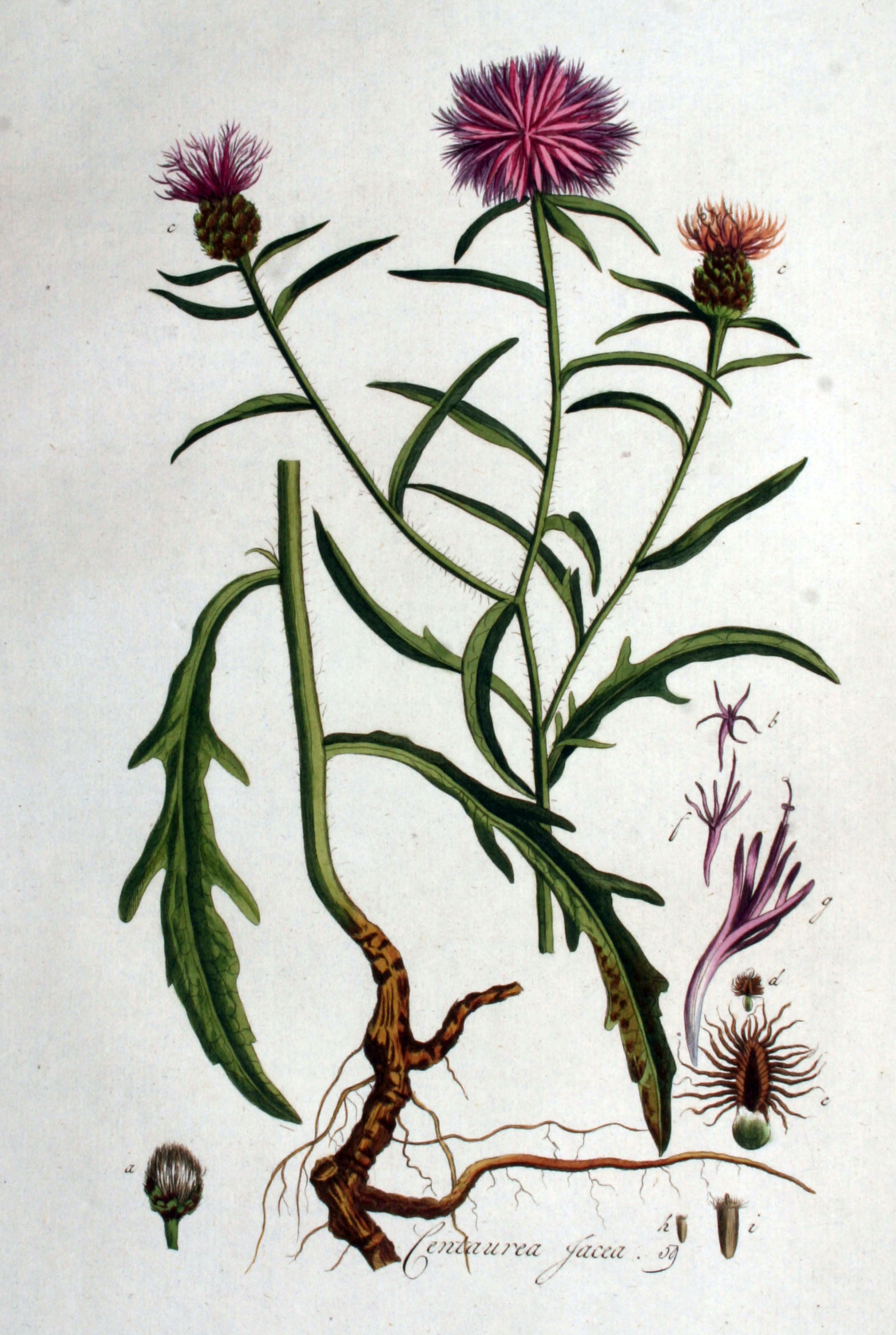 Centaurea jacea L. subsp. grandiflora (Gaudin) Schübl. & Martens